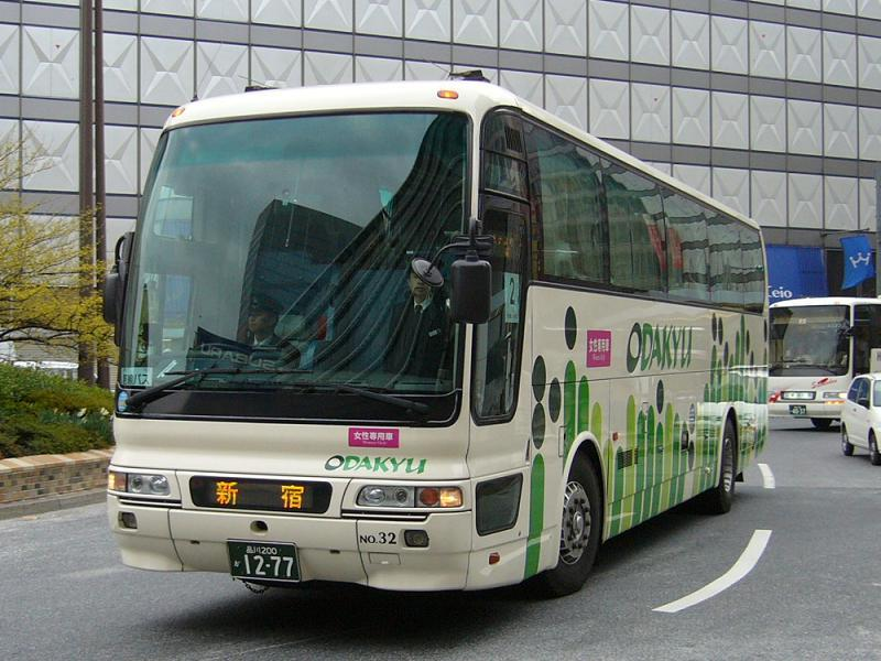 登録番号 品川200か12-77 小田急シティバス所属 車番32 夜行用車両 （各系統で共通運用） 2006年3月25日 新宿駅西口にて撮影